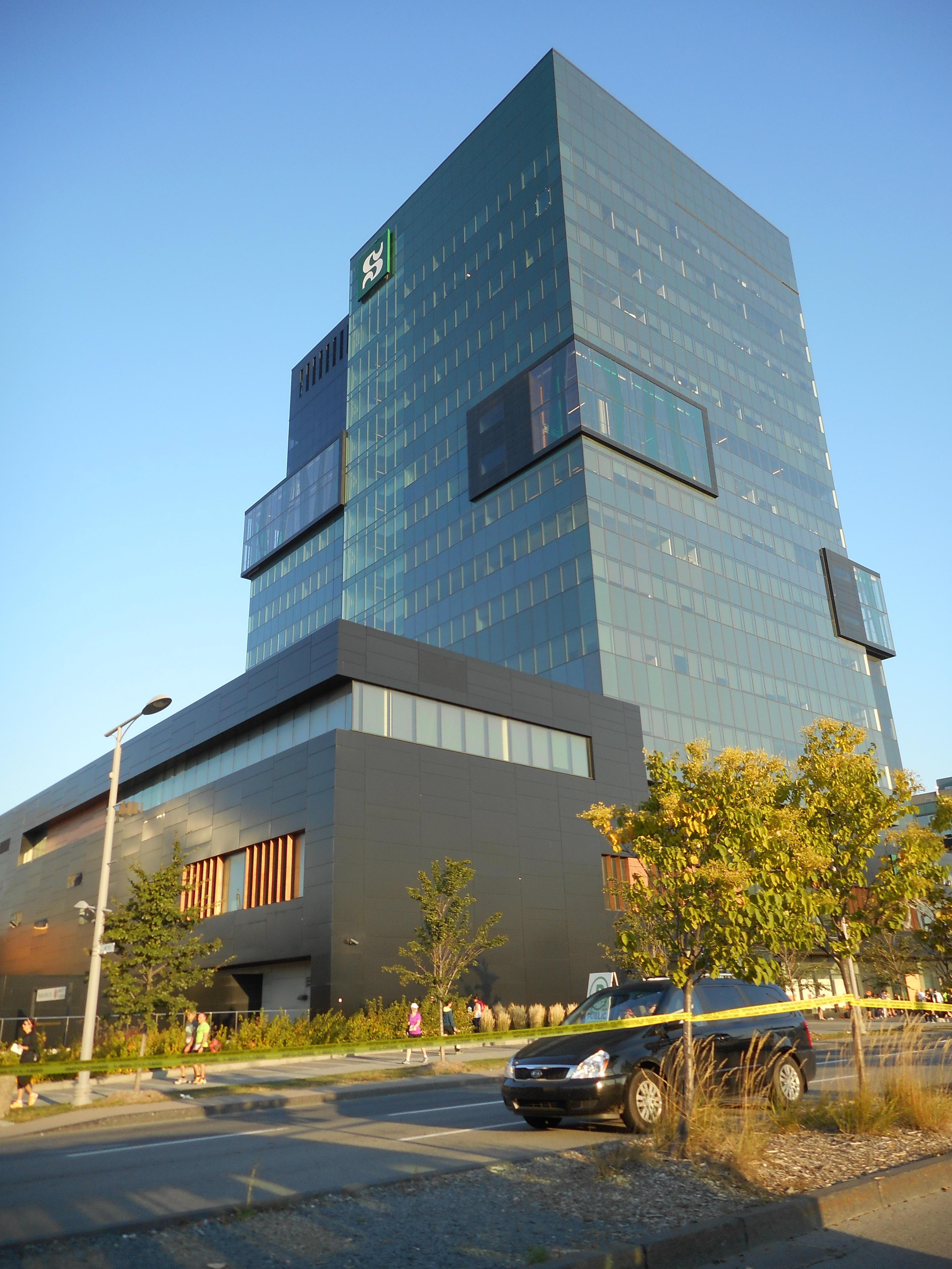 Campus de Longueuil de l'Université de Sherbrooke, 150, Place Charles-Le Moyne, Longueuil